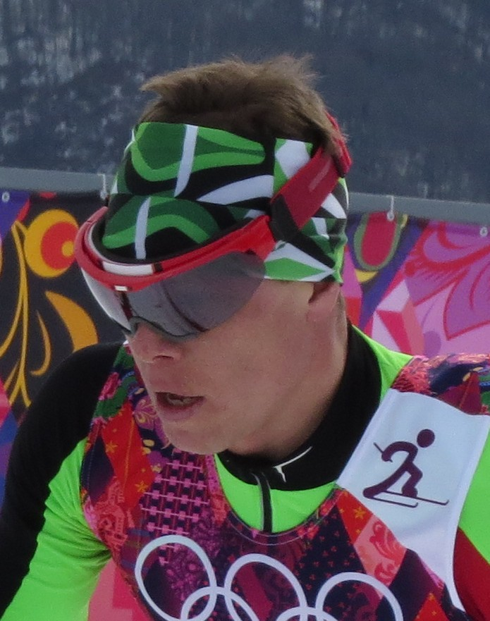 Лыжные гонки на зимних Олимпийских играх 2014 — 15 км классическим стилем (мужчины)